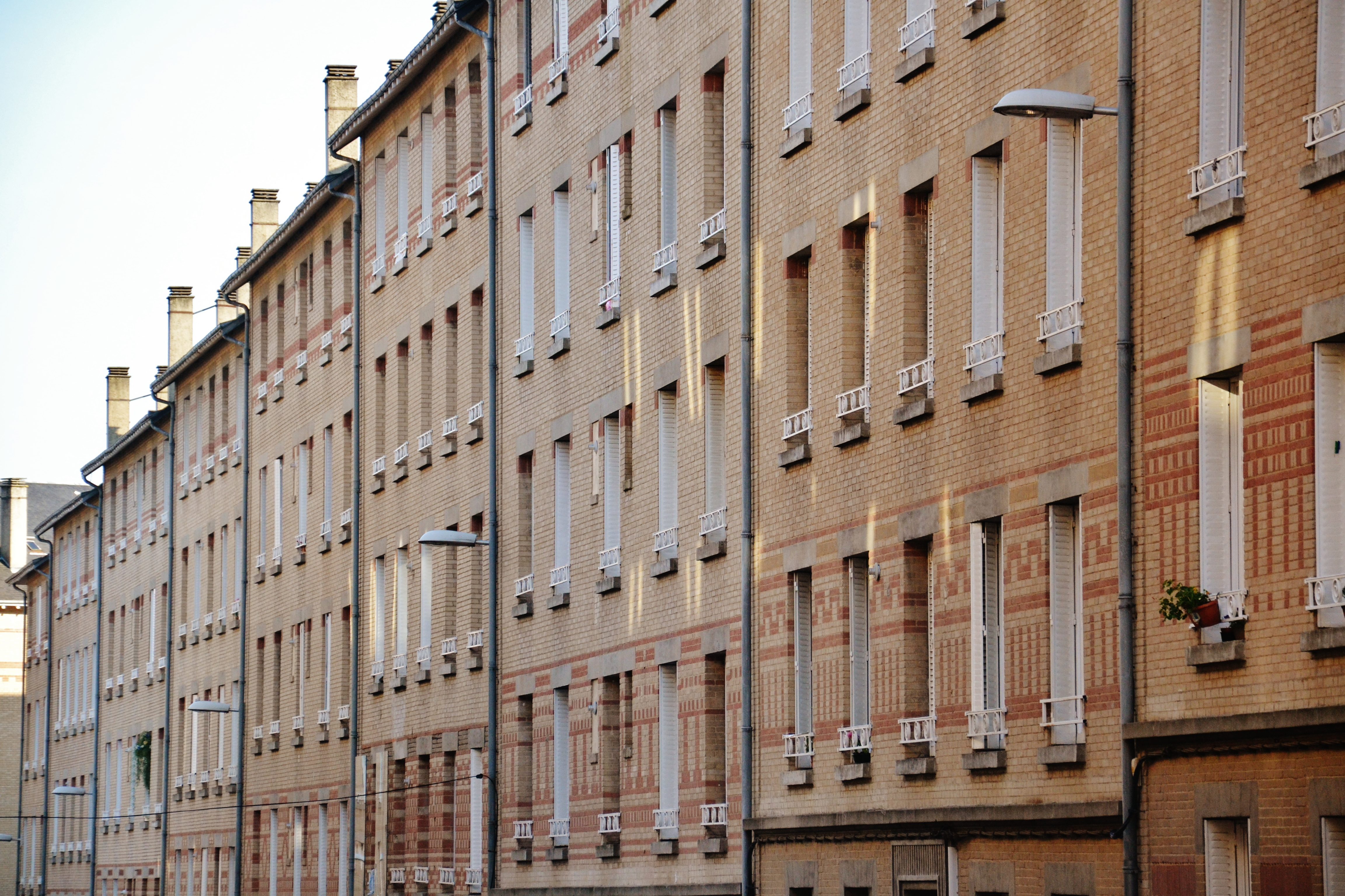 La cité ouvrière des Coutures (Limoges, Haute-Vienne, France)